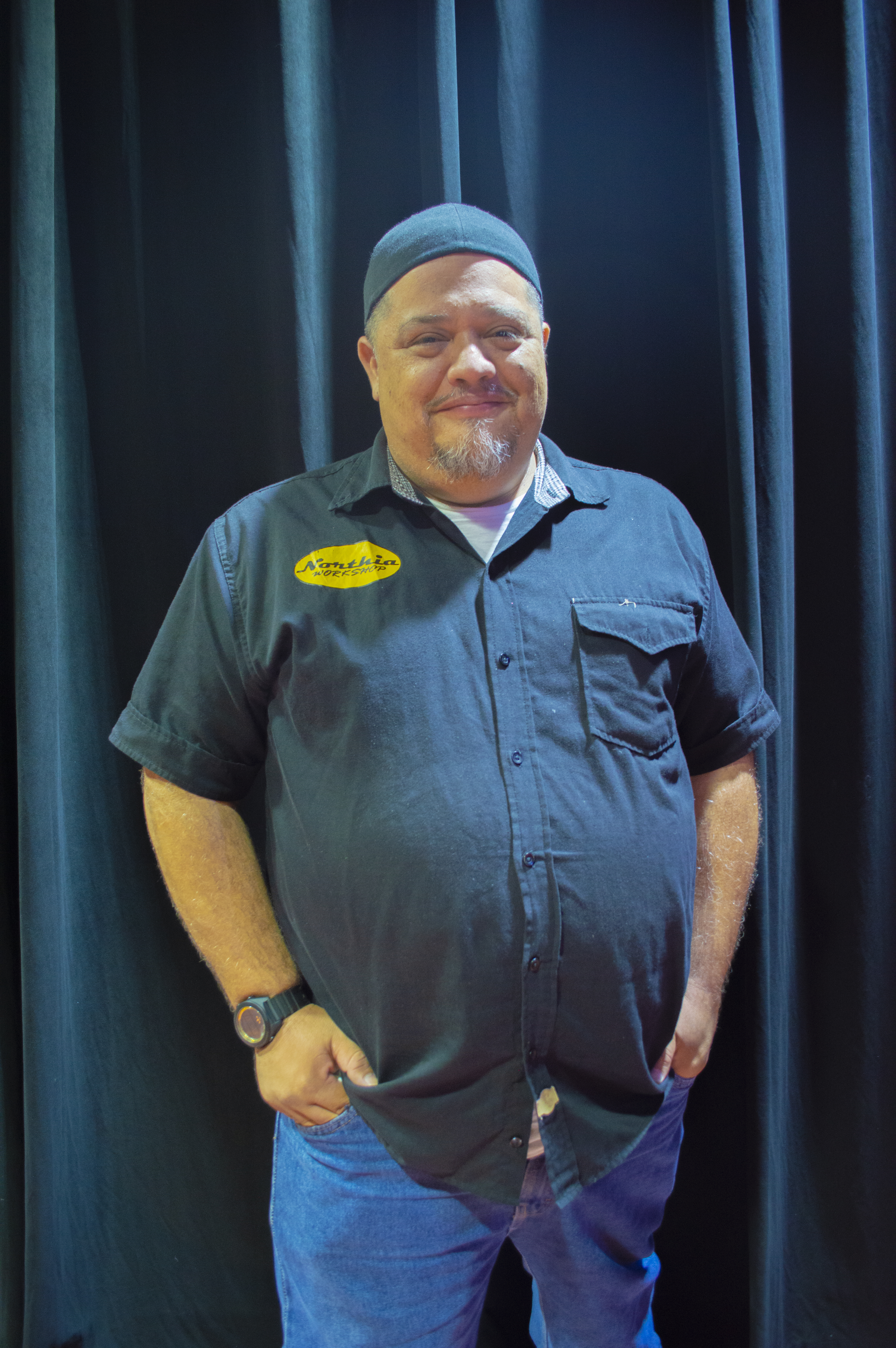 José Northia en 2016, luego de la rueda de prensa del 3 Festival de Teatro Toledo, en la Universidad Salesiana de Guayaquil.